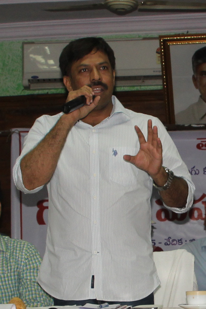 Chairman of Official Language Commission అధ్యక్షులు(ని) - అధికార భాషా సంఘం - ఆంధ్రప్రదేశ్.